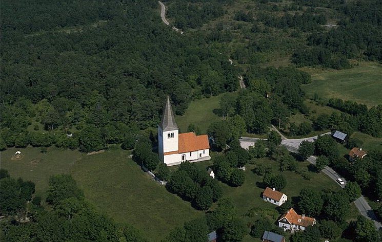 Halls kyrka Motiv: Hall Nyckelord: Flygbilder, Riksintressen Kategori: KyrkomiljöHalls kyrka.